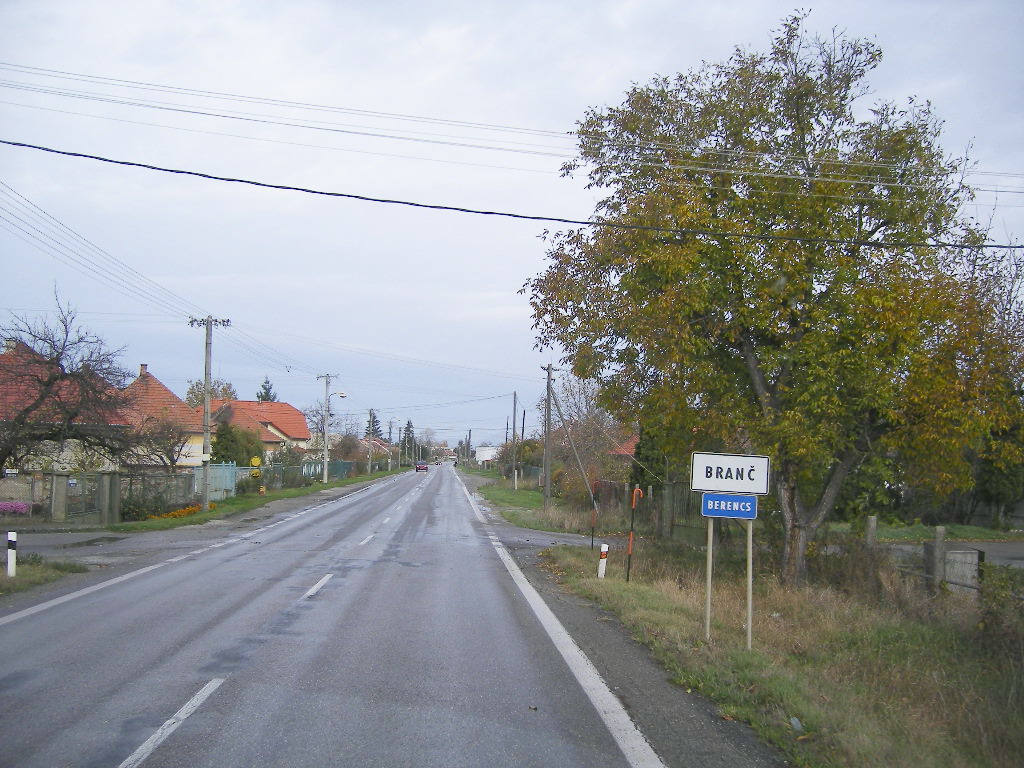 Berencs - 64-es út